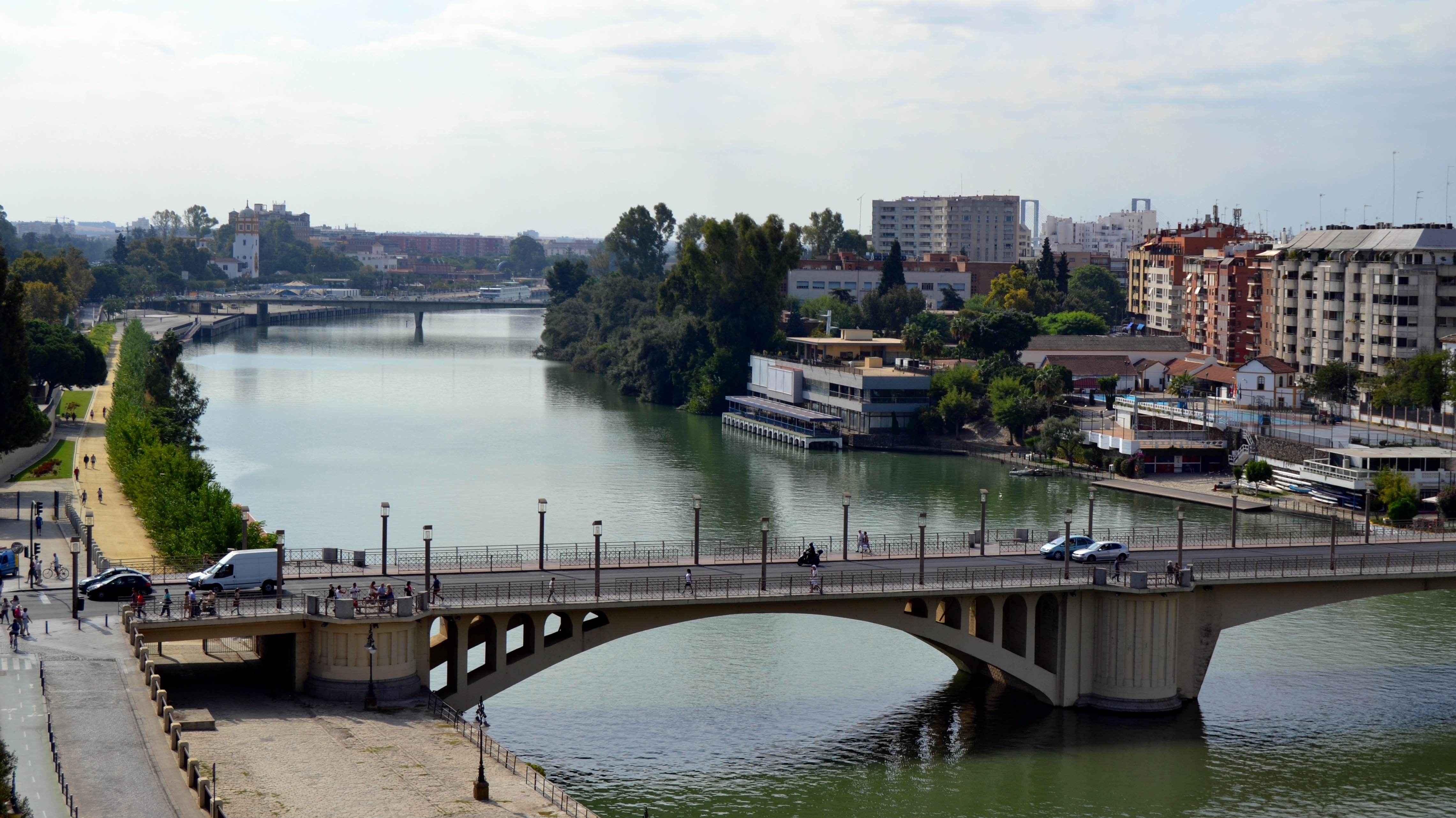 El Guadalquivir desde la Torre del Oro.